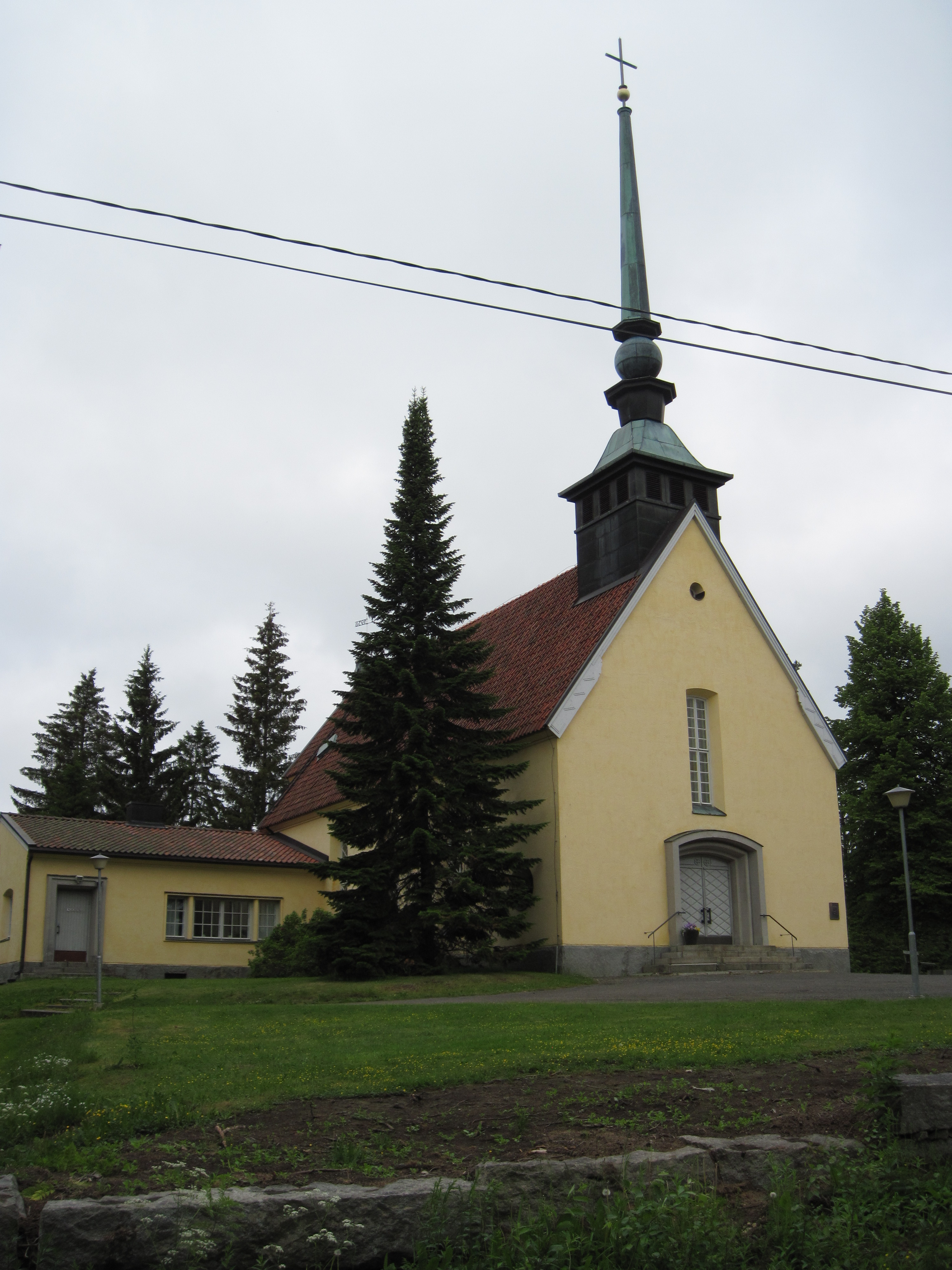 Metsäkansan kirkko kesällä 2012